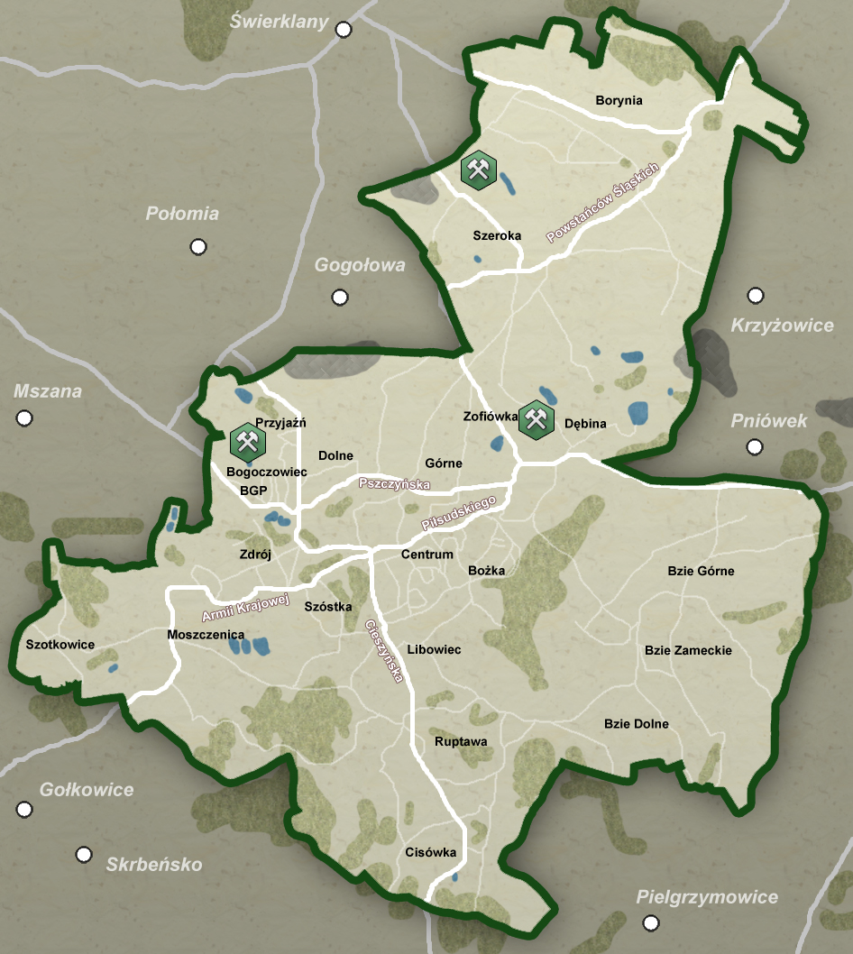 Szkic poglądowy mapy Jastrzębia Zdroju